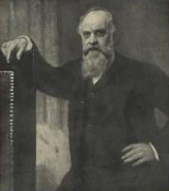 portrét Karla Krattnera (maloval Franz Thiele)